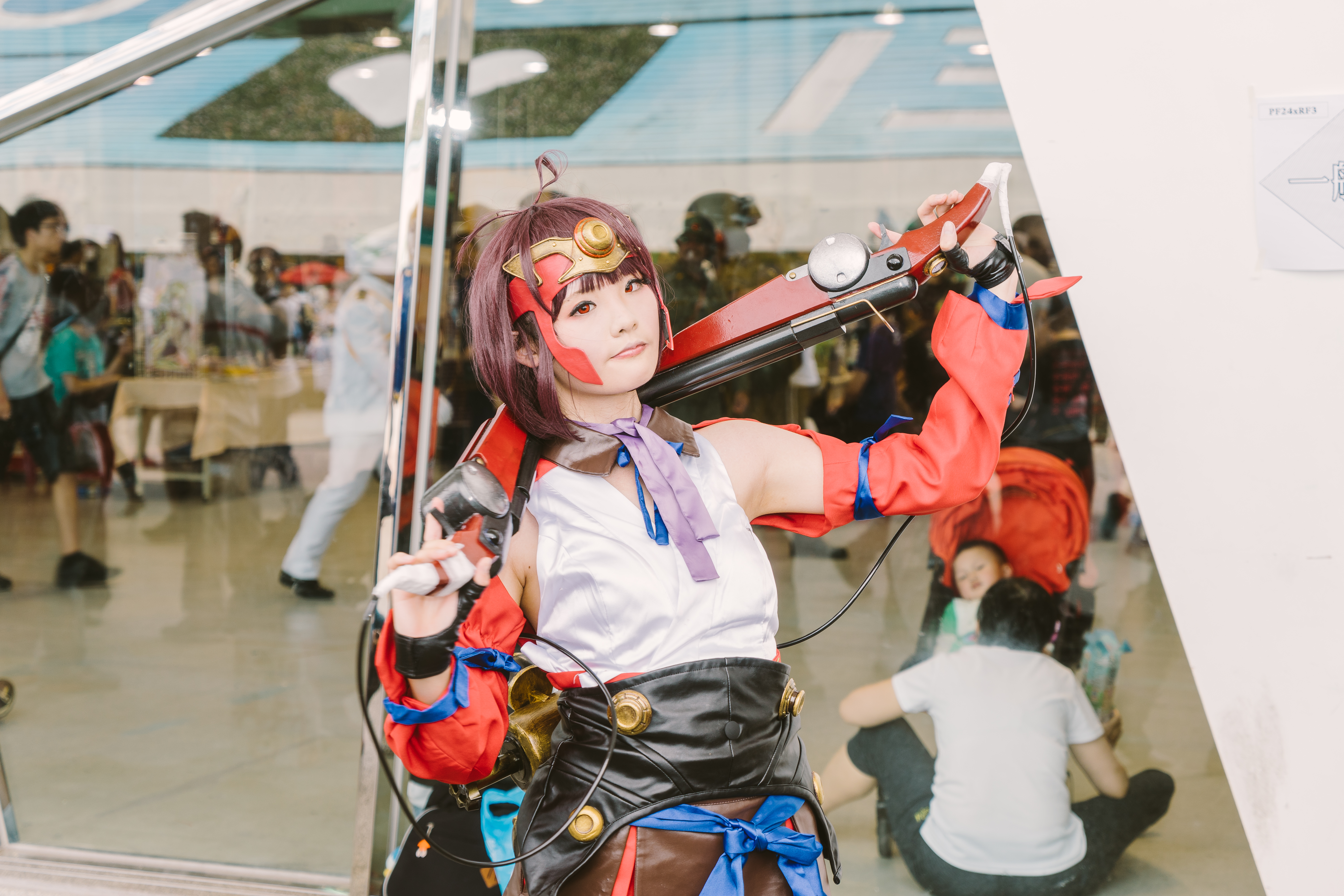 第24屆亞洲動漫創作展，《甲鐵城的卡巴內里》無名cosplayer。